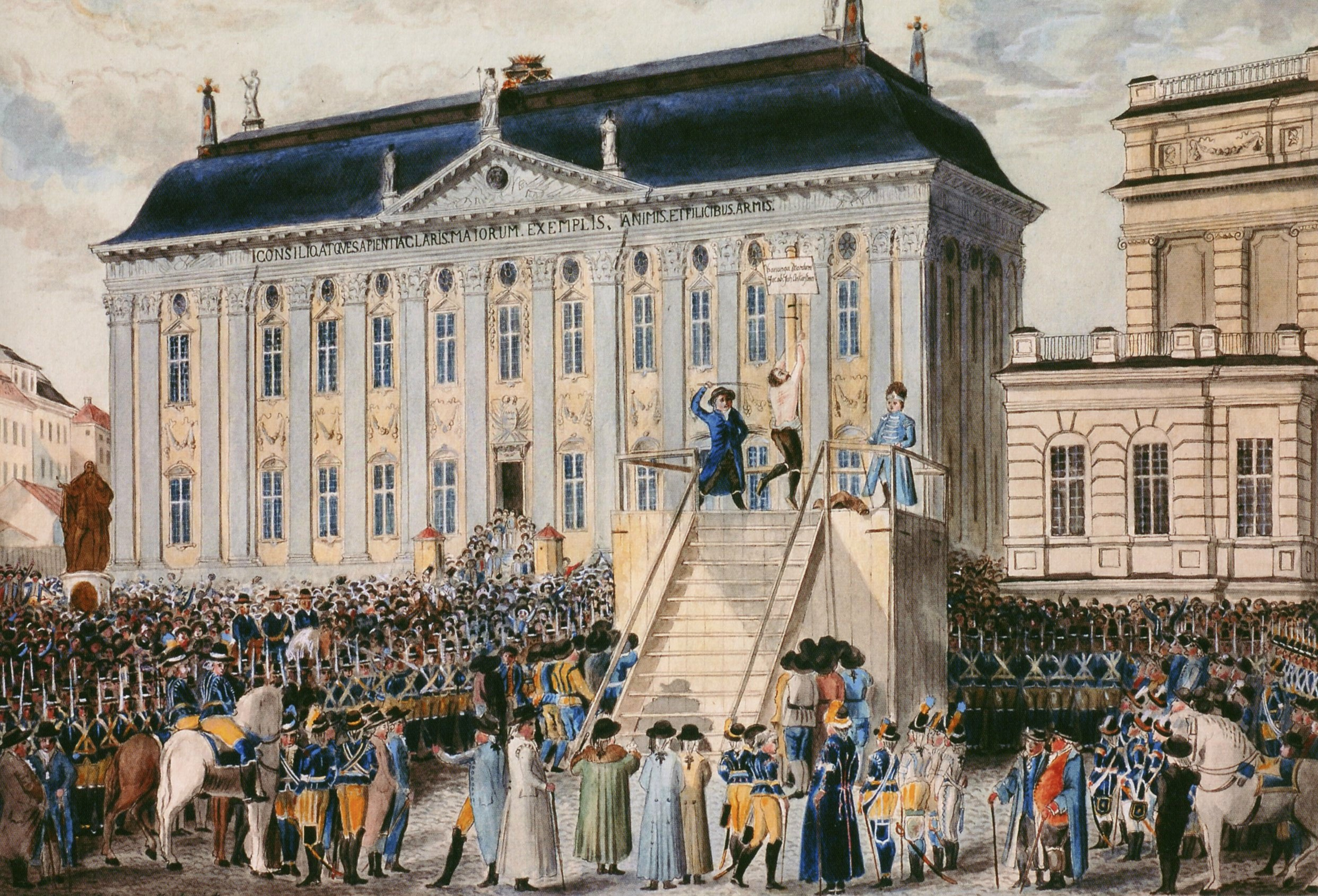 Anckarström pryglas på Riddarhustorget 1792